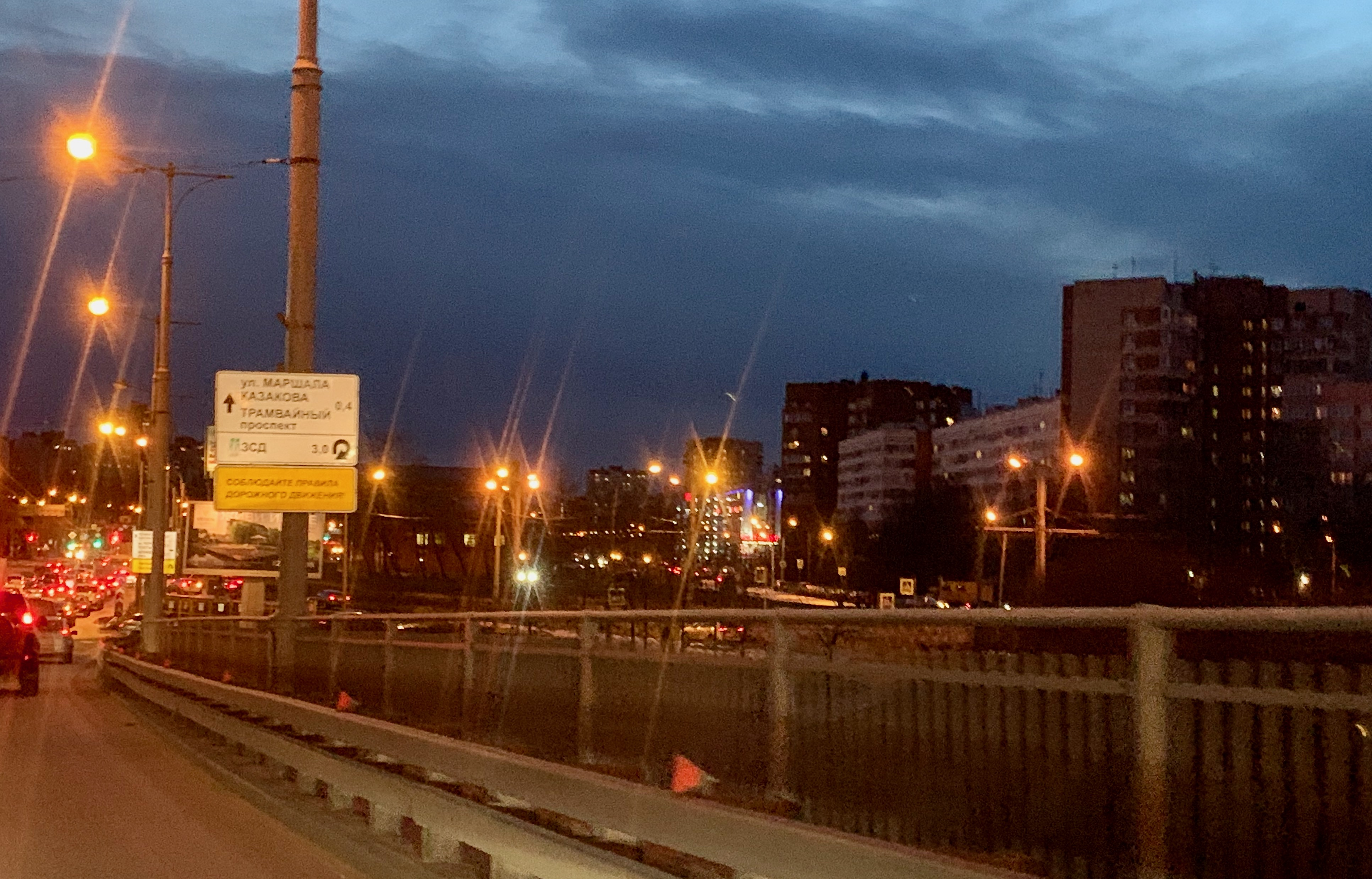 Красненькая речка